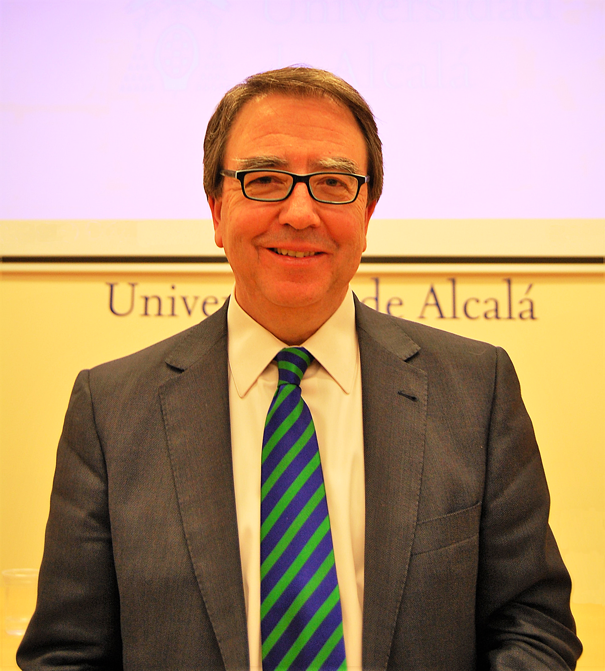 Retrato de Fernando Galván Reula, rector de la Universidad de Alcalá desde 2010 hasta 2018. Fotografía tomada en el salón de actos del Facultad de Filosofía y Letras de Alcalá de Henares (Comunidad de Madrid - España), durante la clausura del curso dedicado a la conmemoración del 500 aniversario del fallecimiento del Cardenal Cisneros.